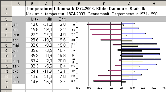 Regneark. Eksempel